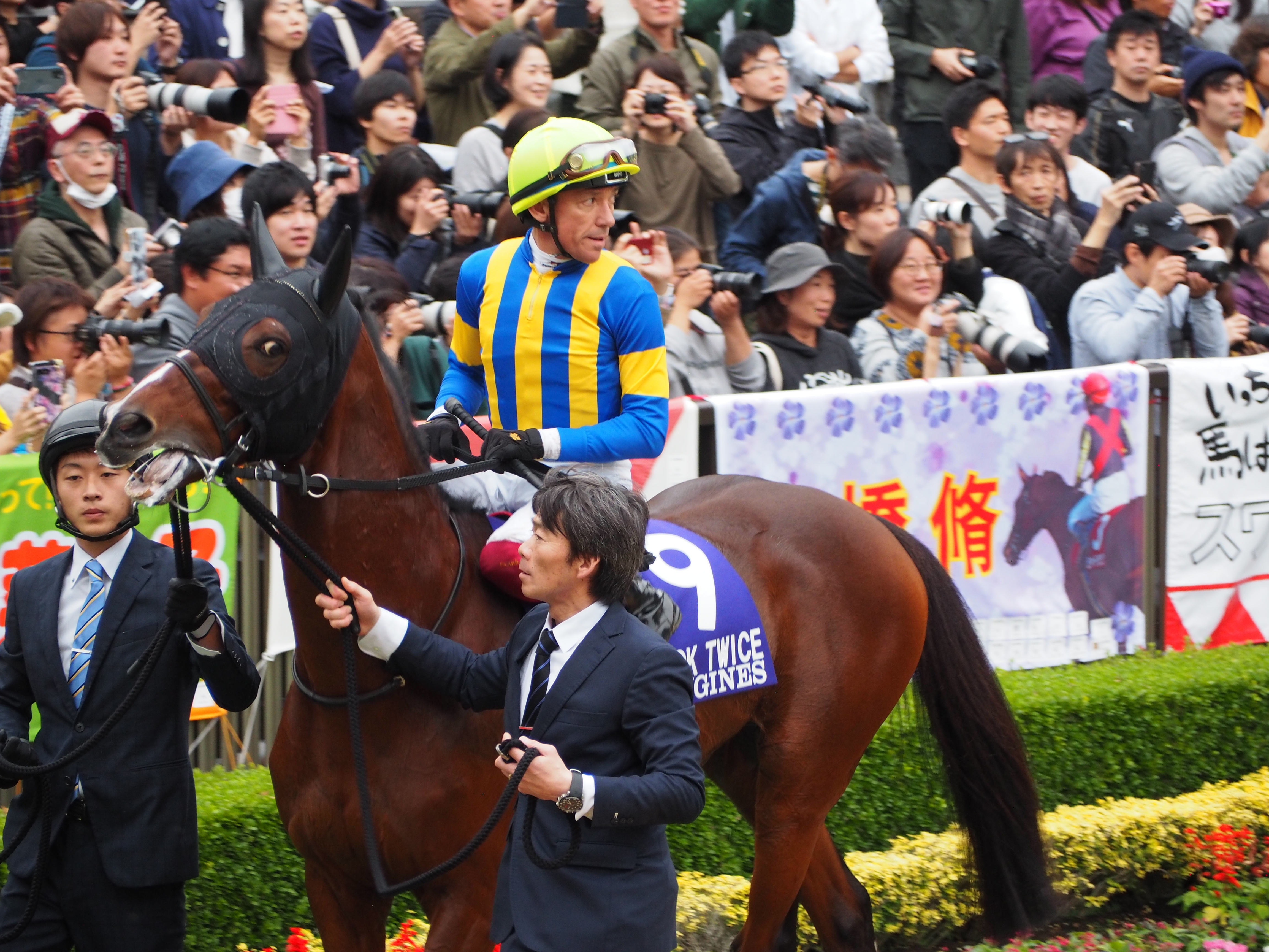 第39回ジャパンカップのパドック、パドックでルックトゥワイスに騎乗する